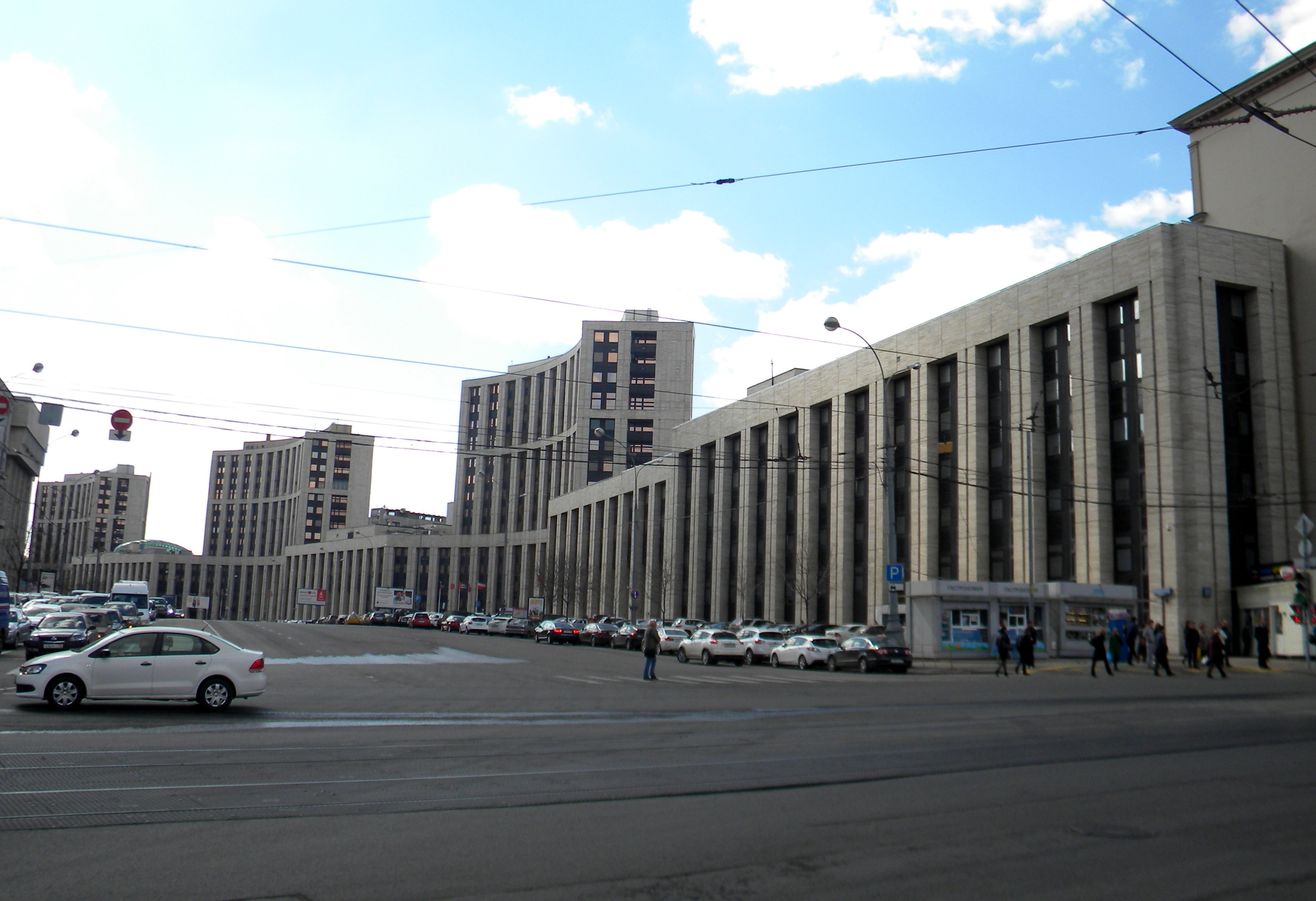 Москва, улица Маши Порываевой